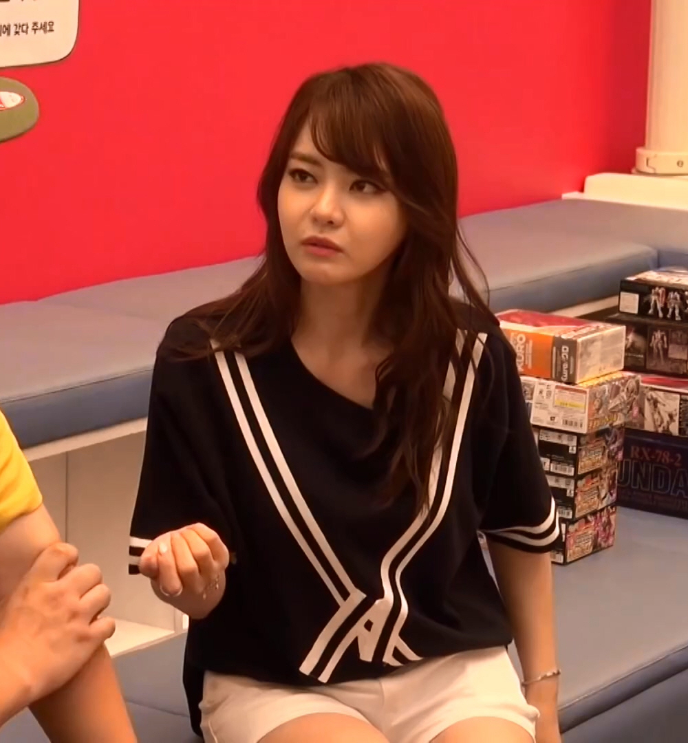 (GO다쿠) 가샤폰 득템에 도전하는 서유리 (시즌2 10화)